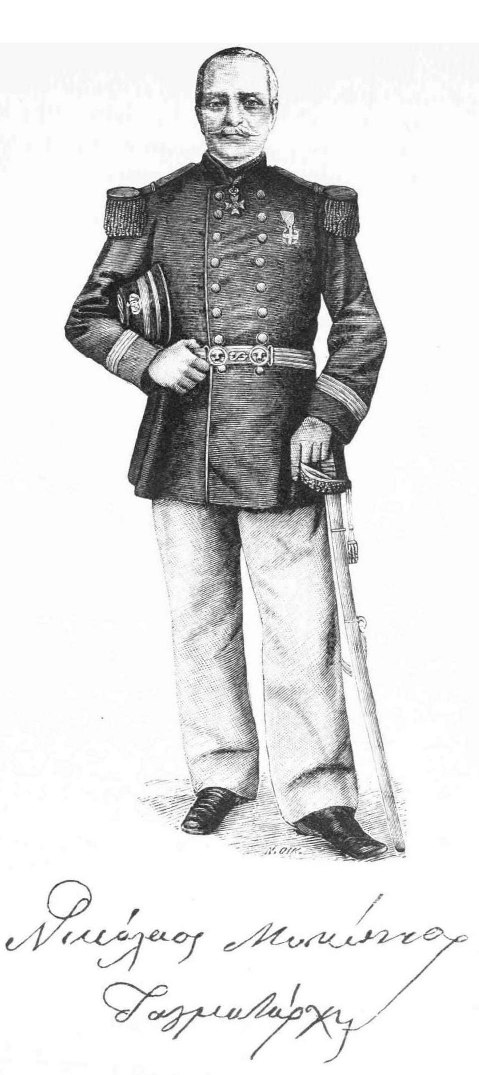 Griechische Persönlichkeit 19. Jahrhundert